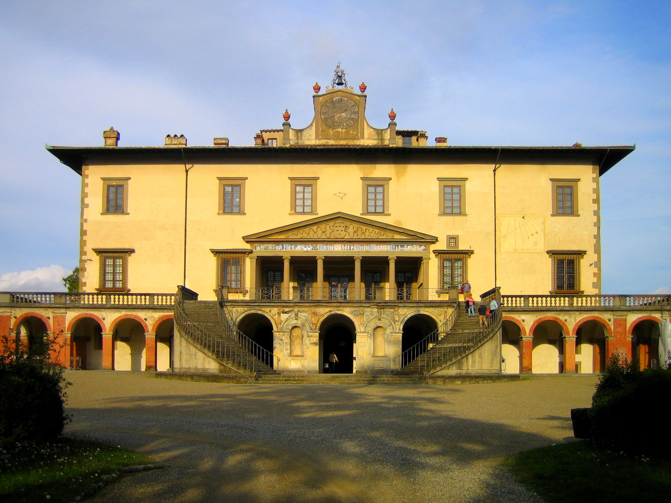 Villa Medicea di Poggio a Caiano (Prato)